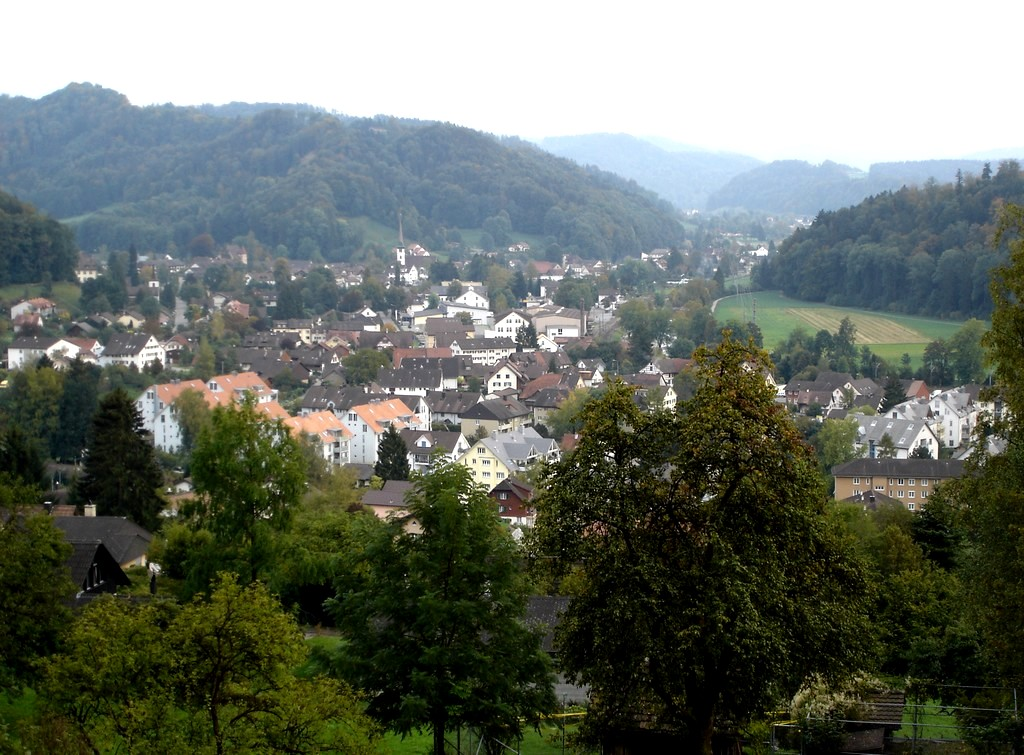 Turbenthal